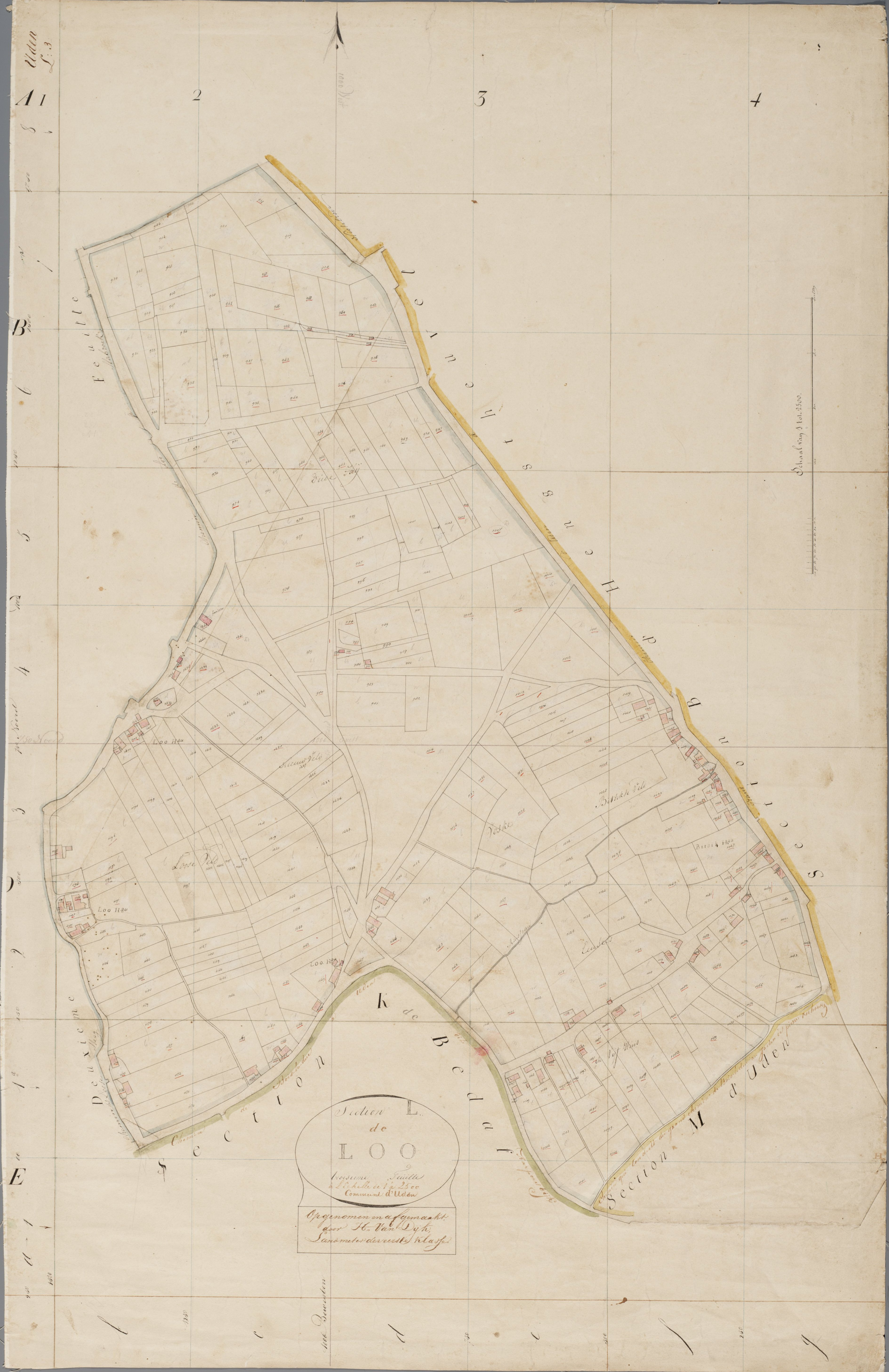 Kadasterkaart 1811 Uden Section L:3 De Loo (Met rechtsonder Vijfhuis)